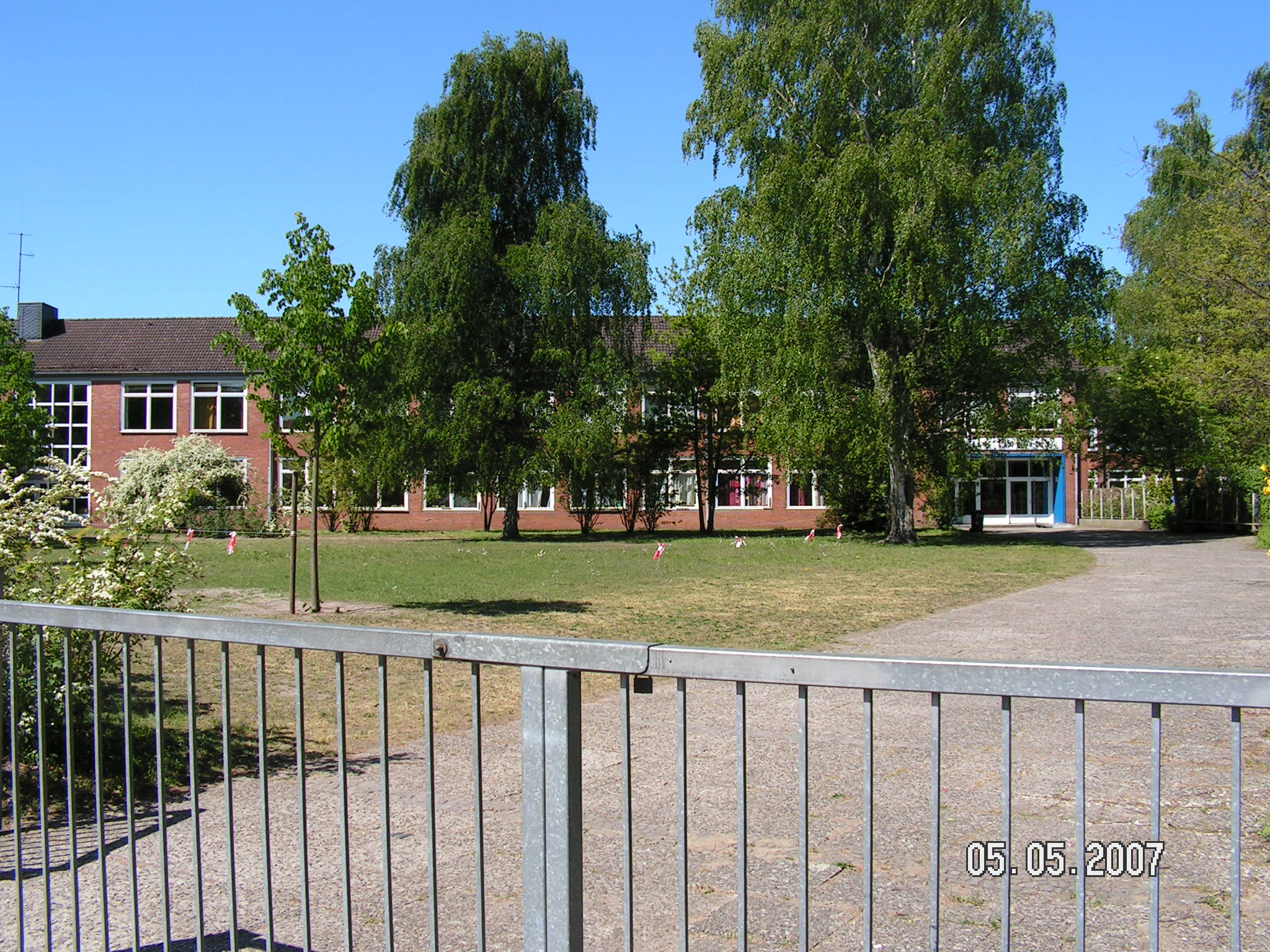 Lübeck-Karlshof/Grundschule Karlshof